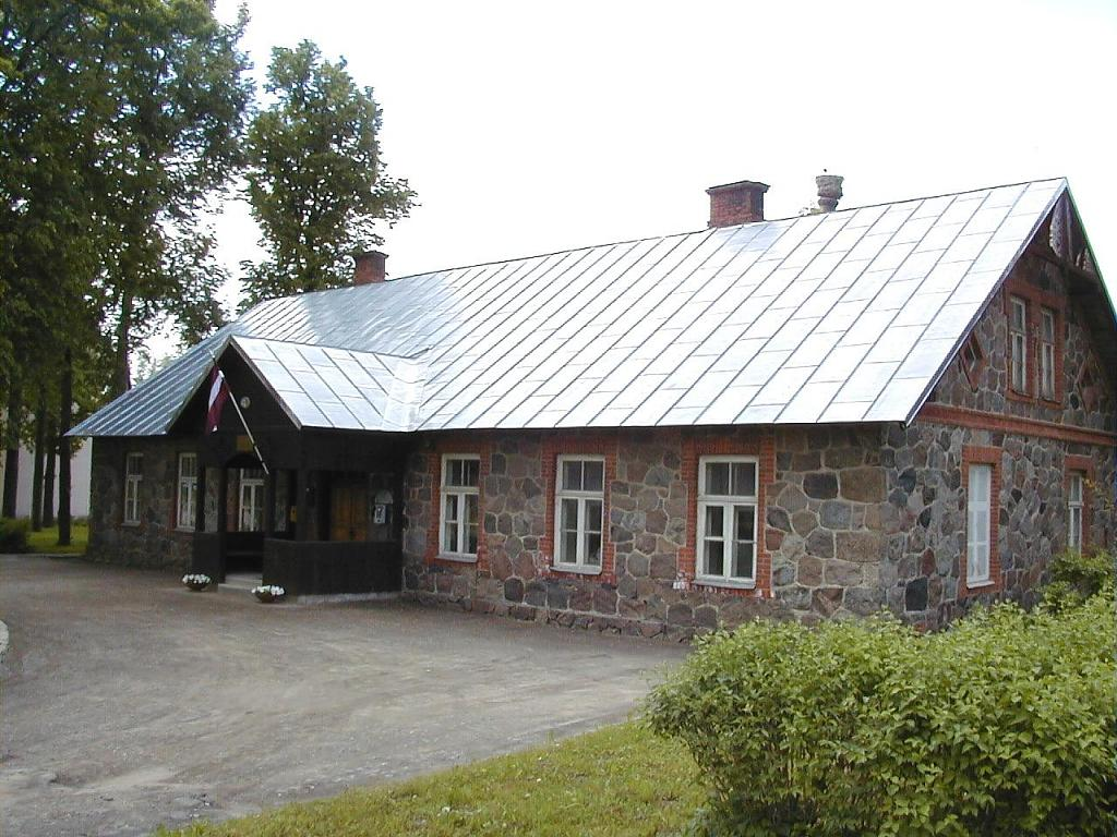 Mārsnēnu pagastnams 2002-06-01